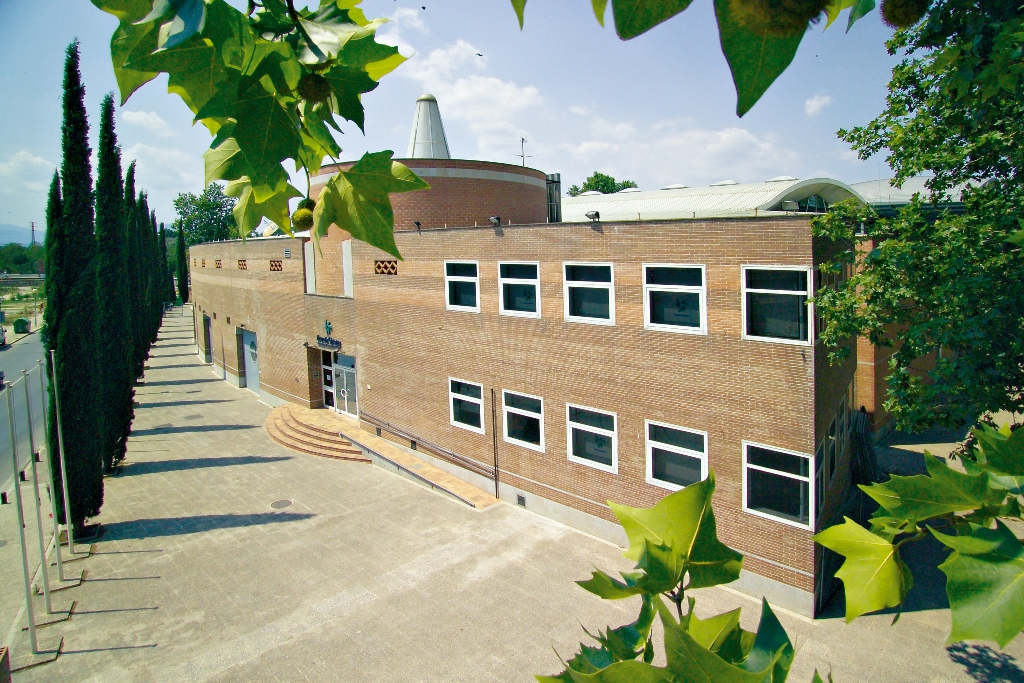 emblemàtic edifici situat al Parc de la Devesa